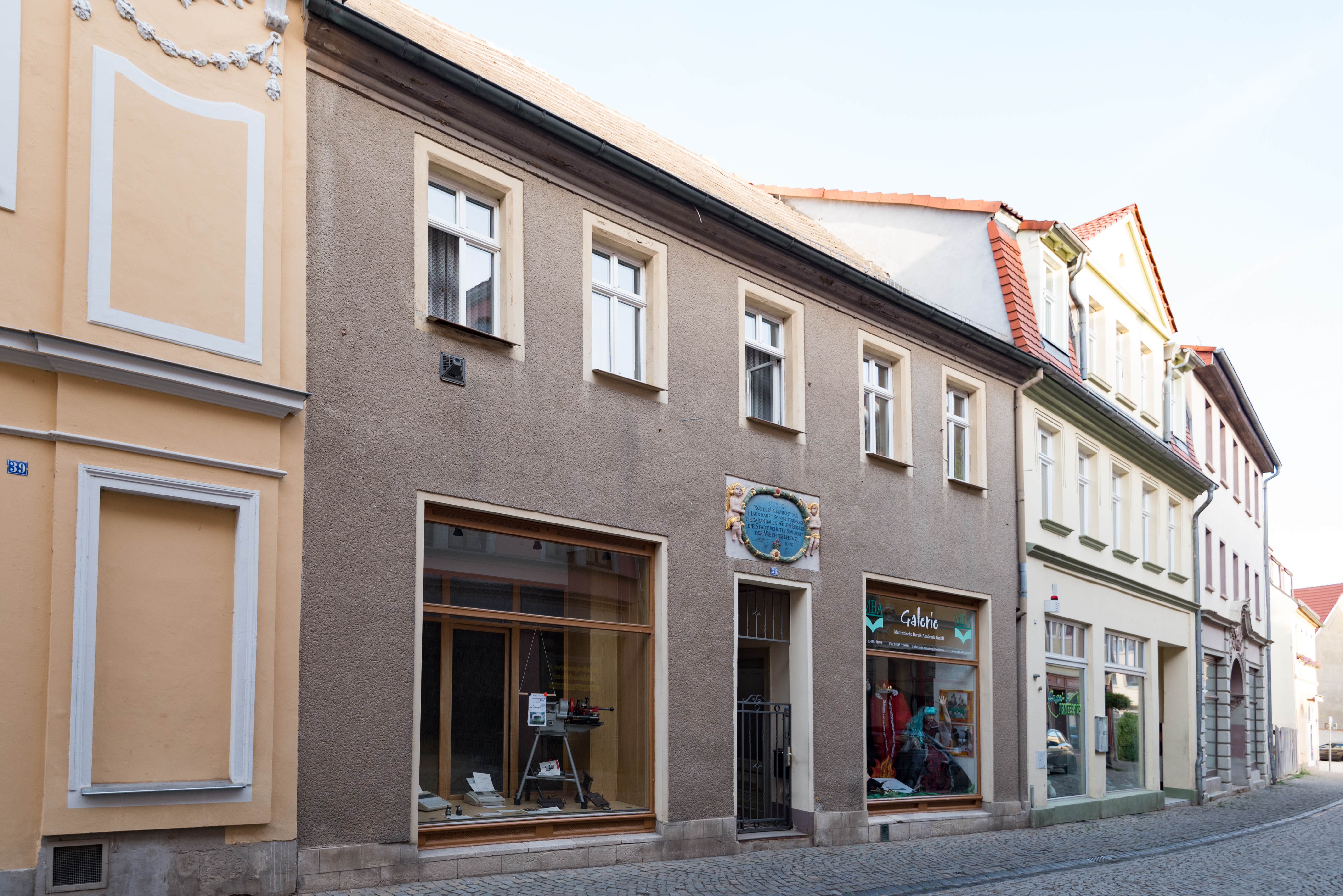 Naumburg (Saale), Wenzelsstraße 38